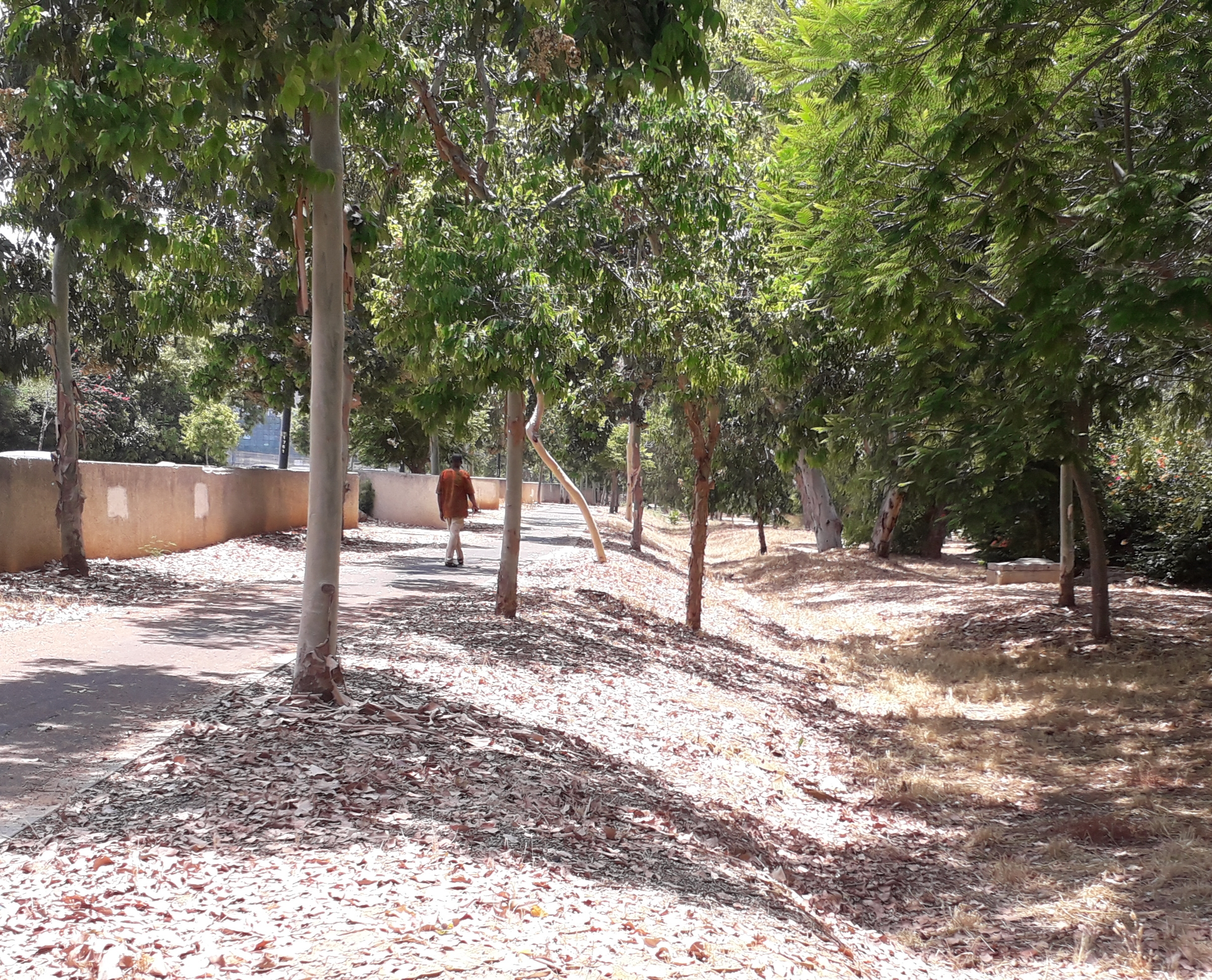 נחל גלילות, שביל הליכה ואופניים לאורך הנחל במקביל לרחוב נעמי שמר